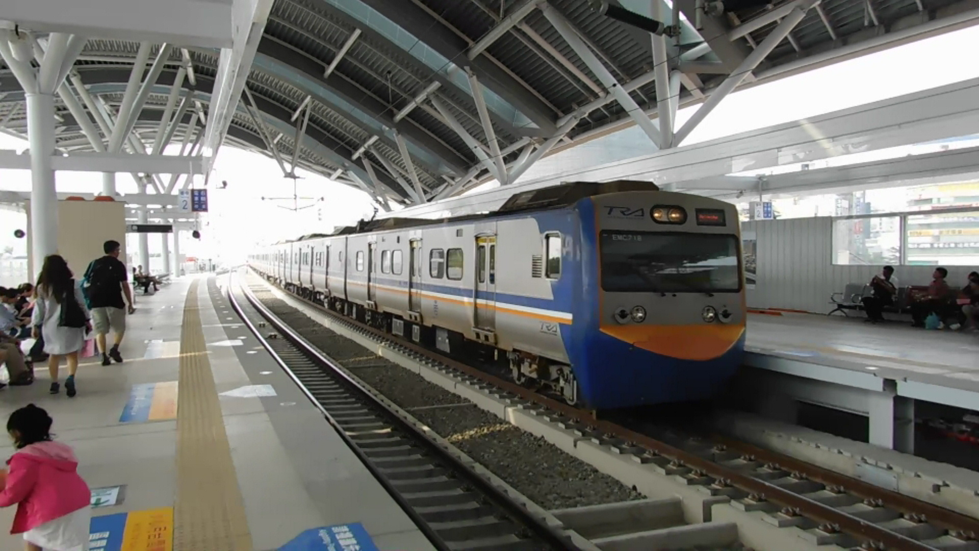 EMU718台中新站